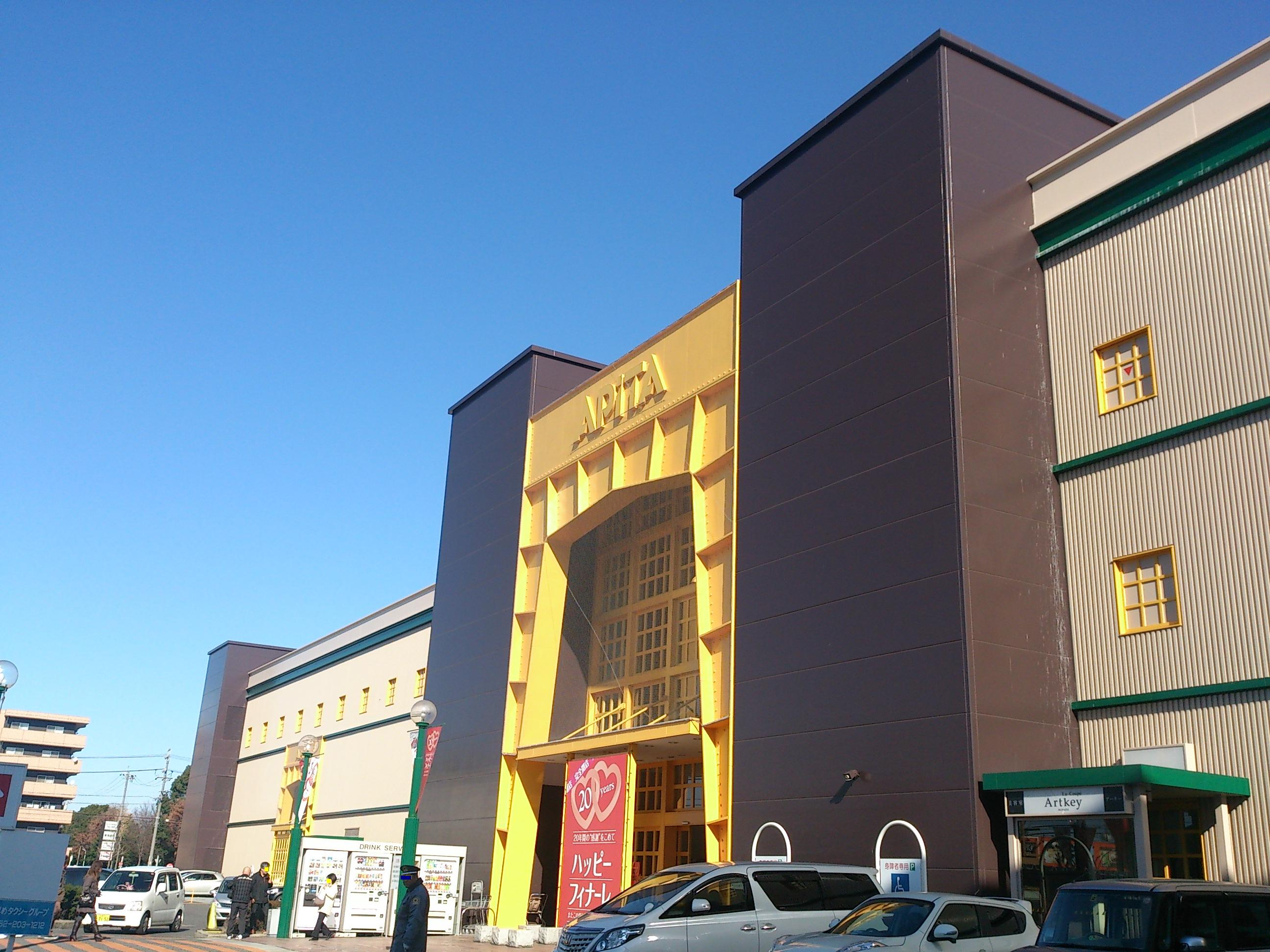 アピタ港店